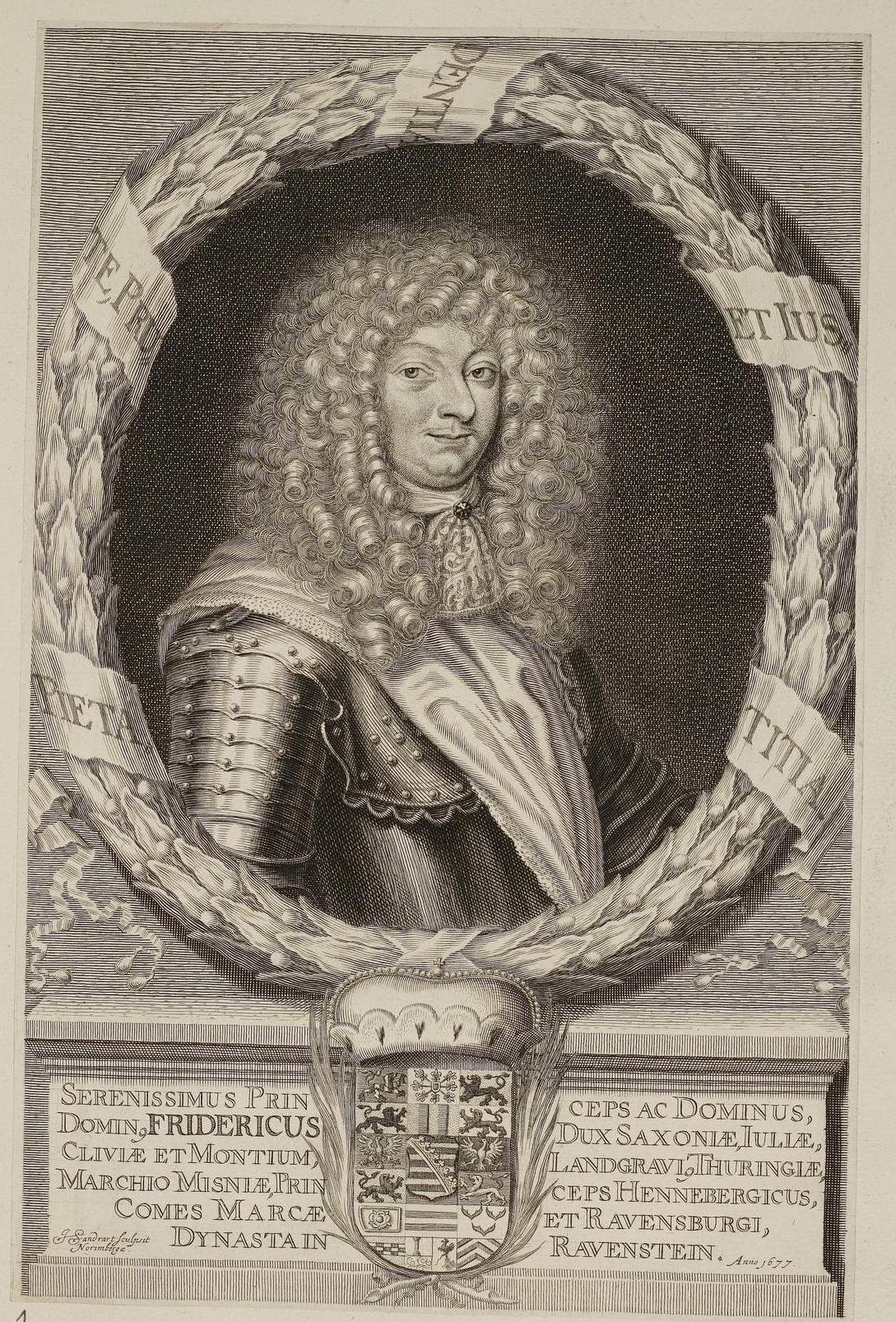 Grafik aus dem Klebeband Nr. 1 der Fürstlich Waldeckschen Hofbibliothek Arolsen Motiv: Herzog Friedrich I. von Sachsen-Gotha-Altenburg